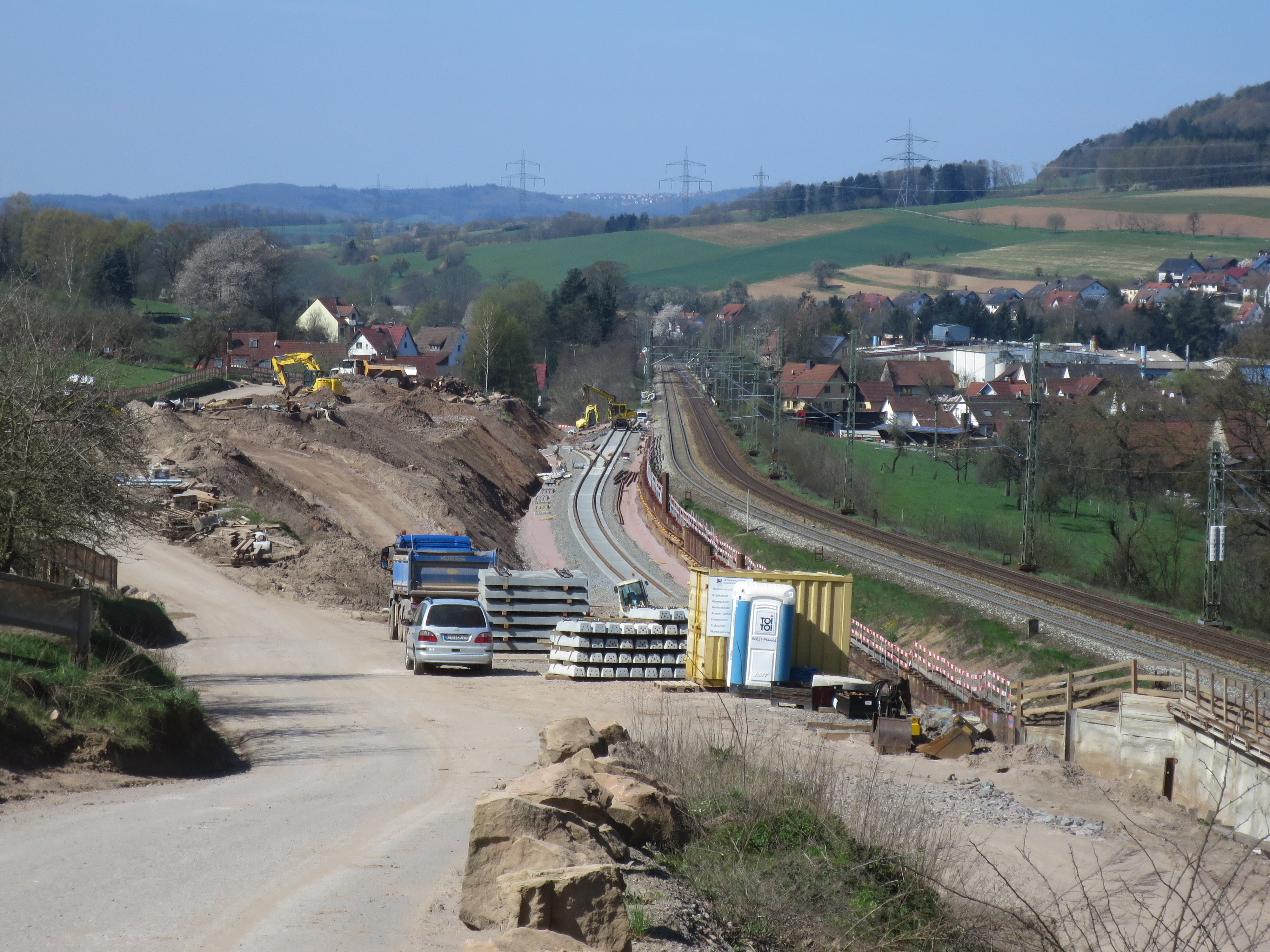 Westliche Einfädelung der Umfahrungsstrecke der Spessartrampe in die Bestandsstrecke